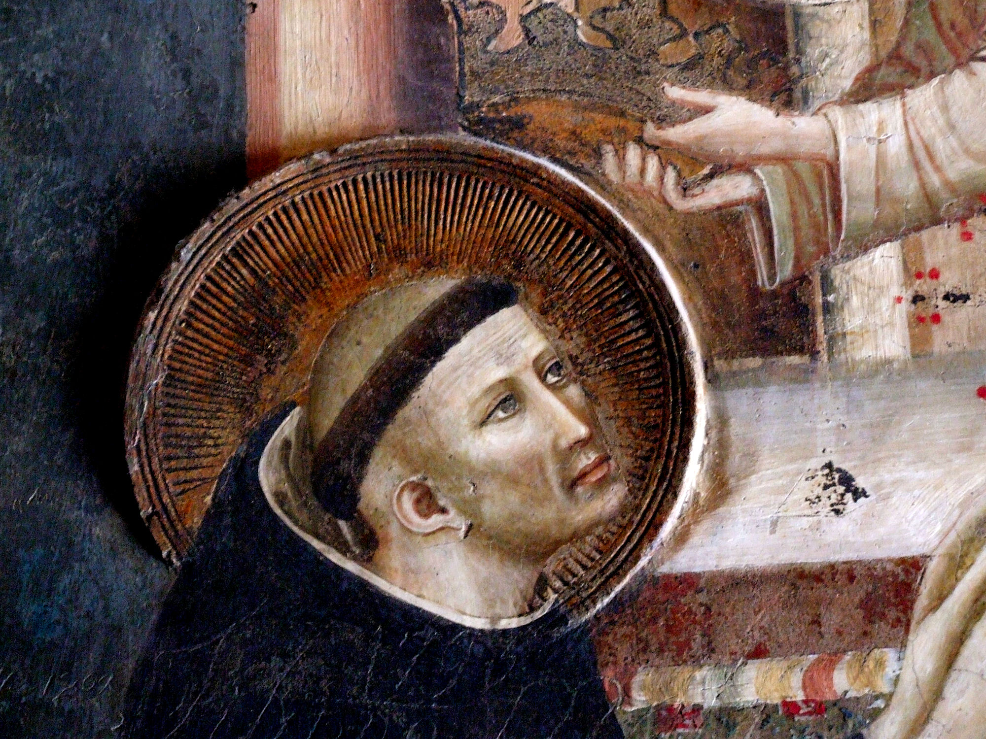 Cappellone di San Nicola, Basilica di San Nicola da Tolentino, Tolentino, Italy